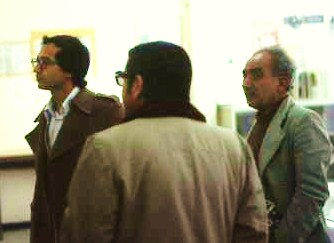 Les écrivains algériens Tahar Djaout, Messaour Boulanouar et M'hamed Aoune en 1981 dans une exposition de littérature